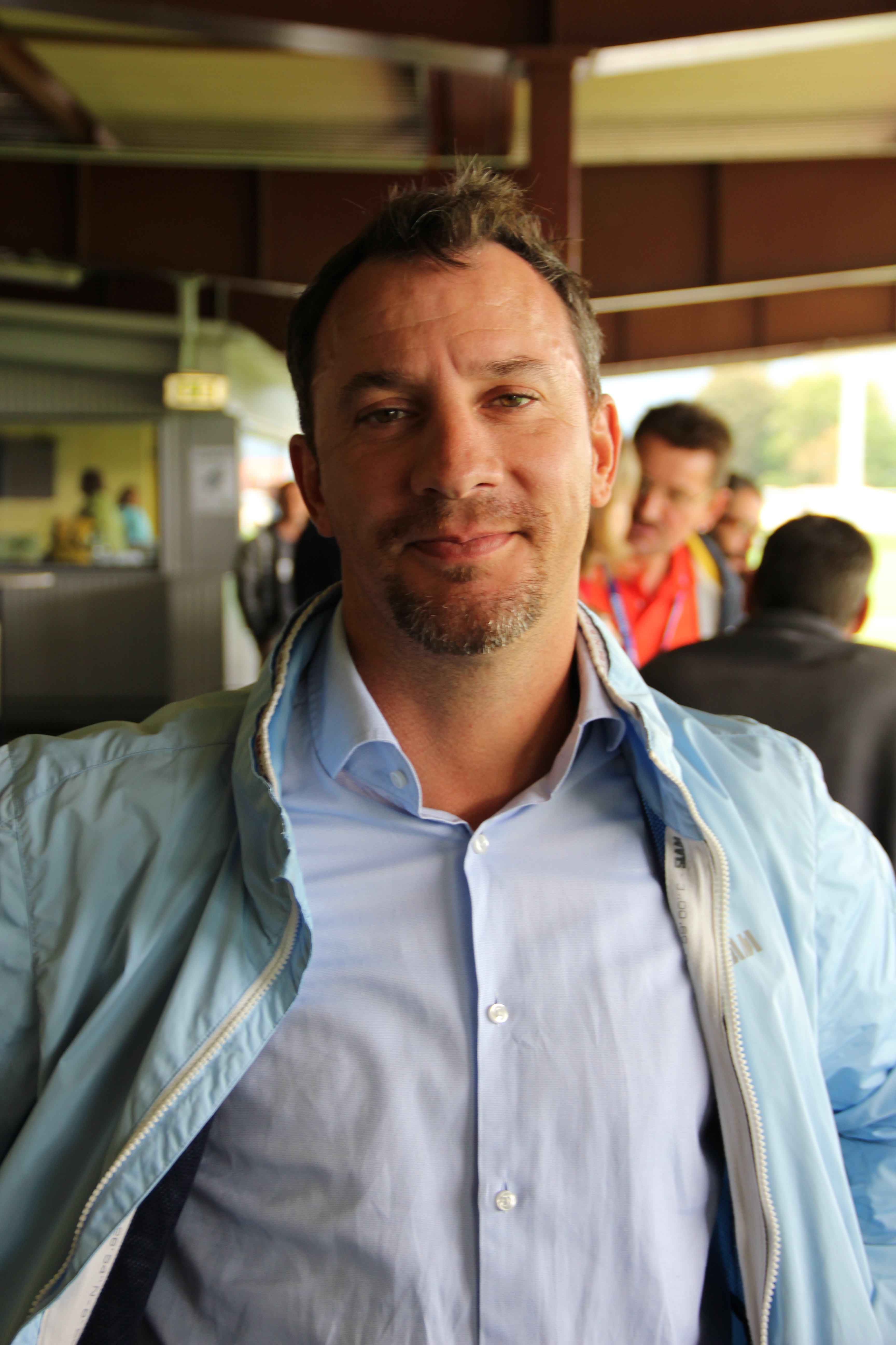 Zeltweger Legendenturnier 2018